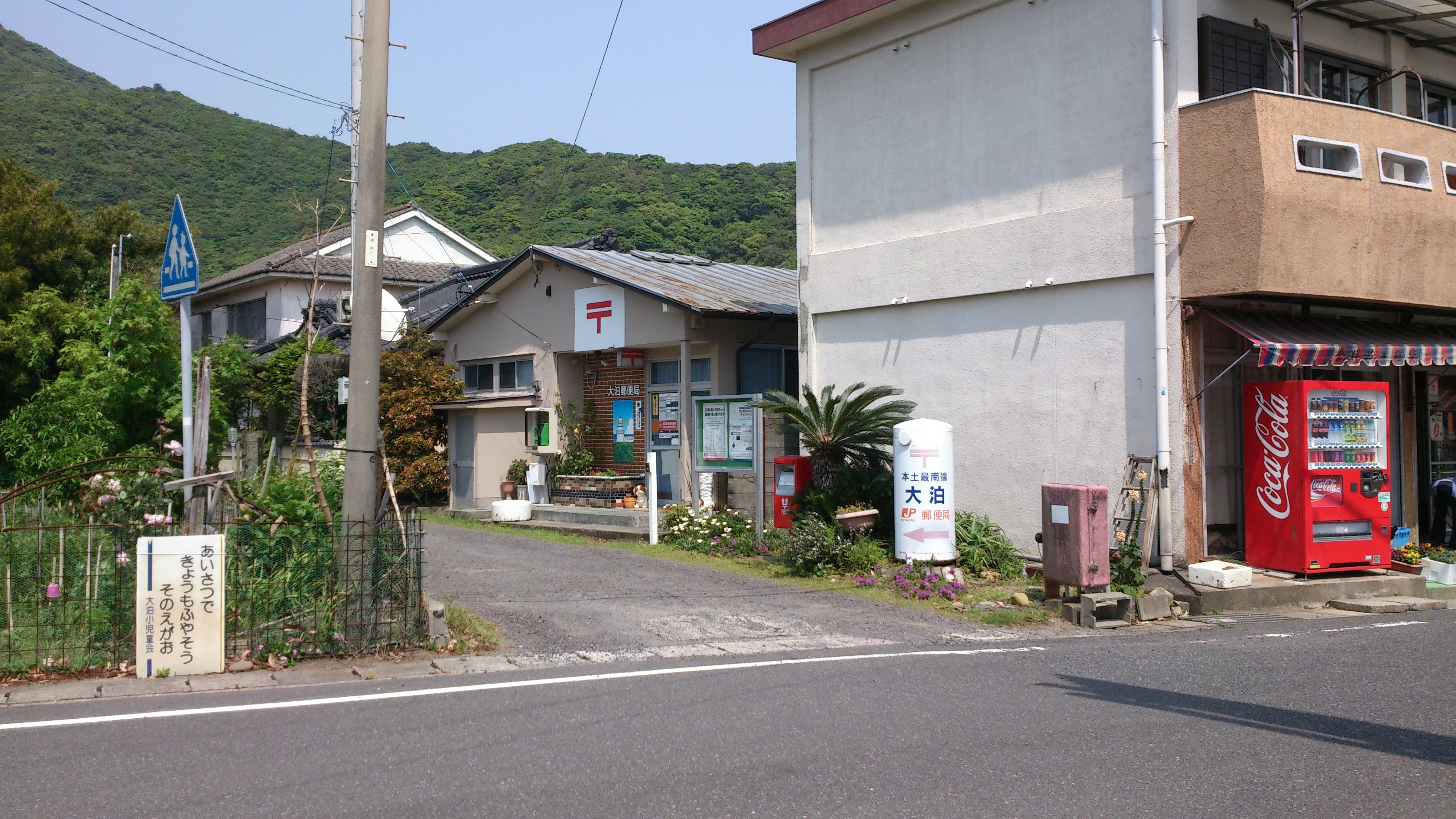 本土最南端の郵便局